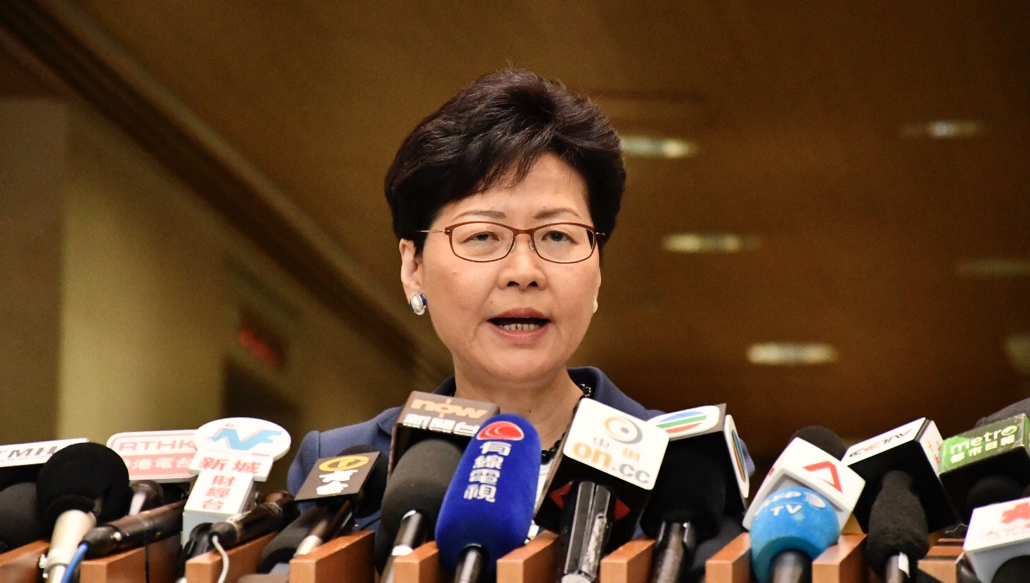 香港特首林鄭月娥回應6-9反送中大遊行，認為人數多無爭議。（美國之音湯惠芸攝）